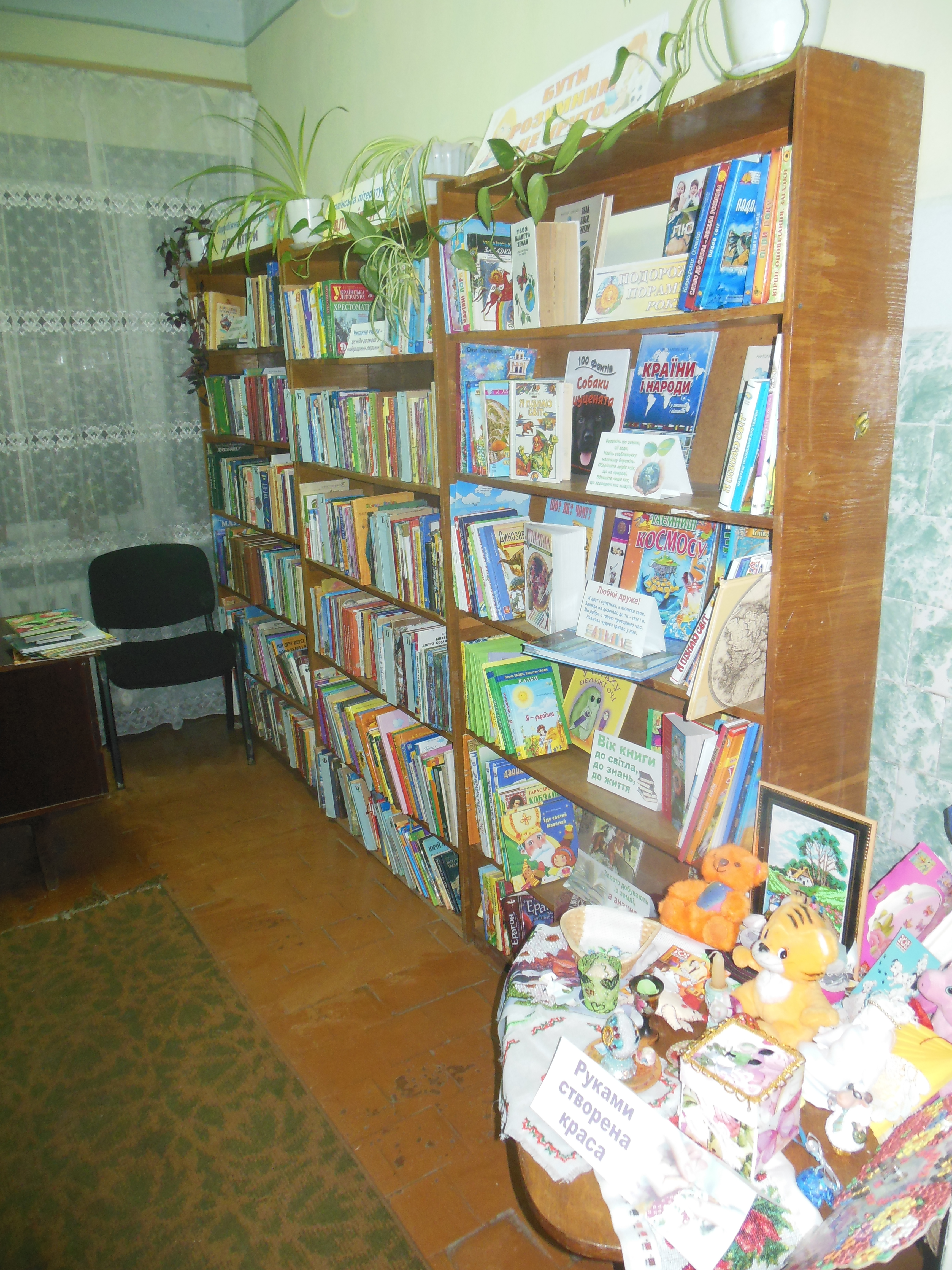 Дитячий відділ бібліотеки